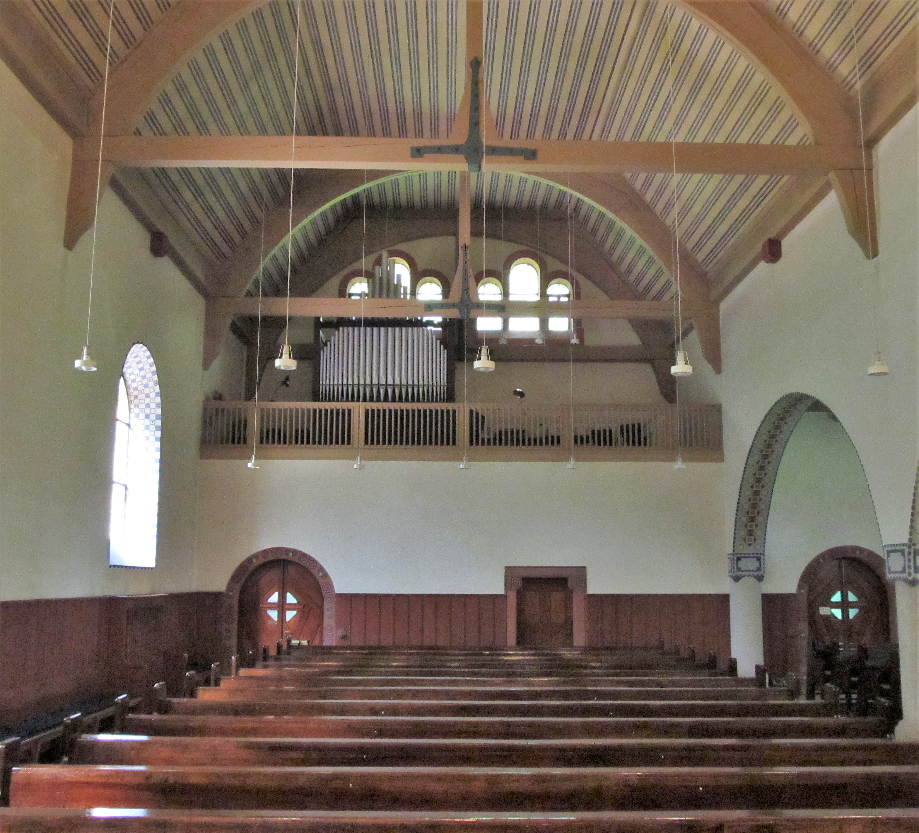 Blick ins Innere der Klinikkirche des Homburger Universitätsklinikums in Homburg, Saarland